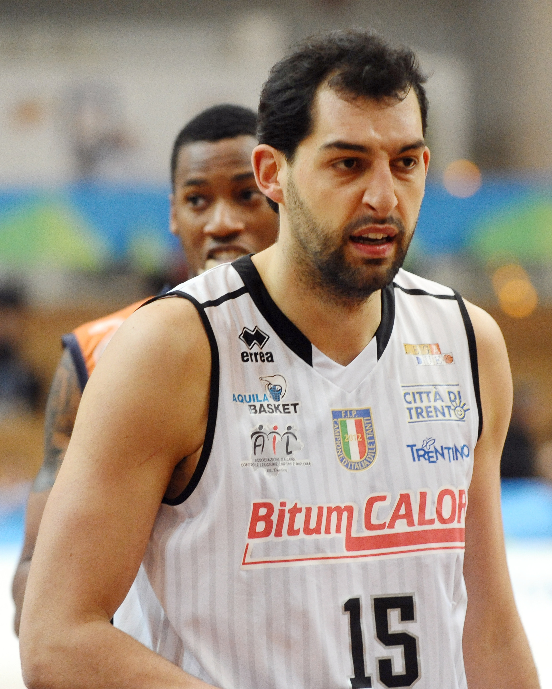 Luca Garri con la maglia dell'Aquila Basket Trento al PalaTrento in una partita di Legadue contro l'Aurora Basket Jesi.